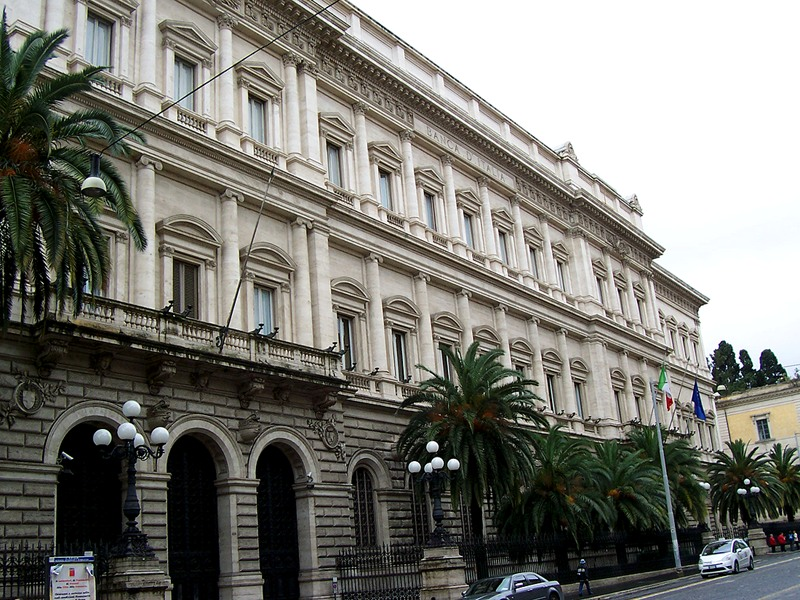 Roma - Palazzo Koch (Banca d'Italia)